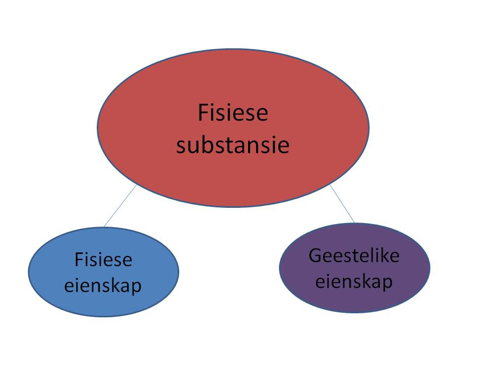 Property Dualism Presentation